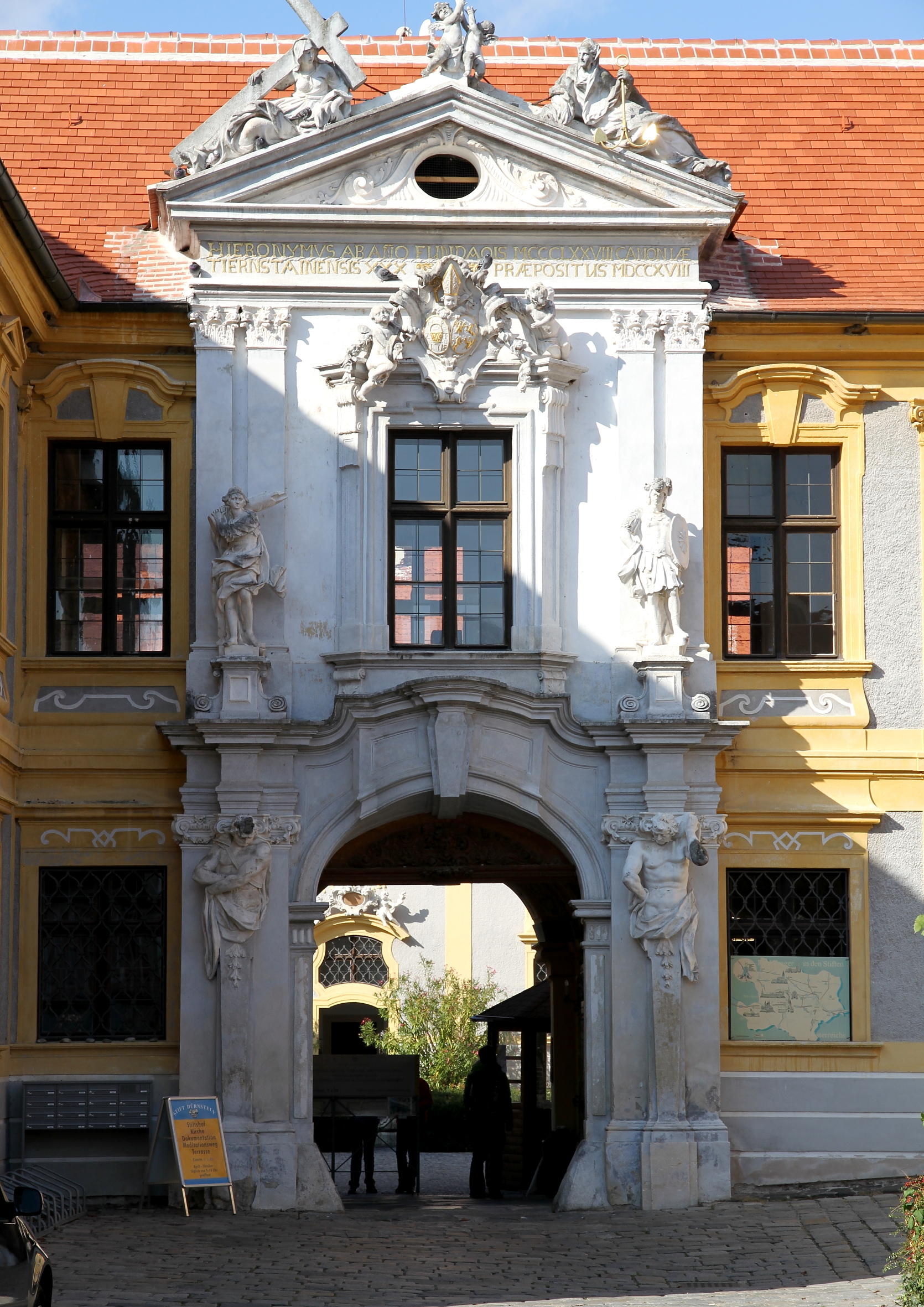 Portal des ehemaligen Augustinerchorherrenstiftes in Dürnstein.